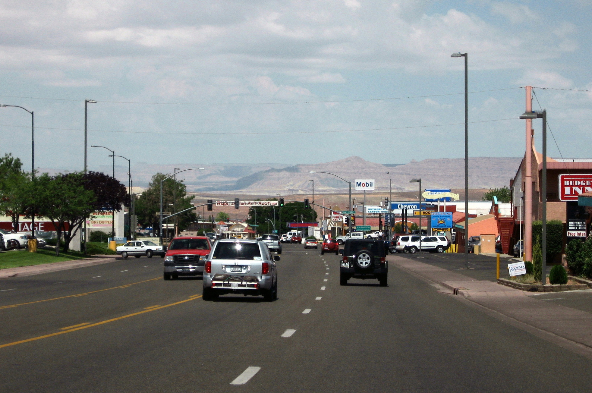 Downtown Page, Arizona mit der US 89 in Fahrtrichtung Norden